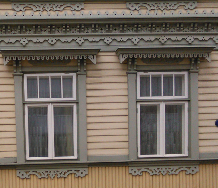 Lenderi majal esineb sedavõrd rikkalikku puitpitsi harva. Allika 8, Tallinn